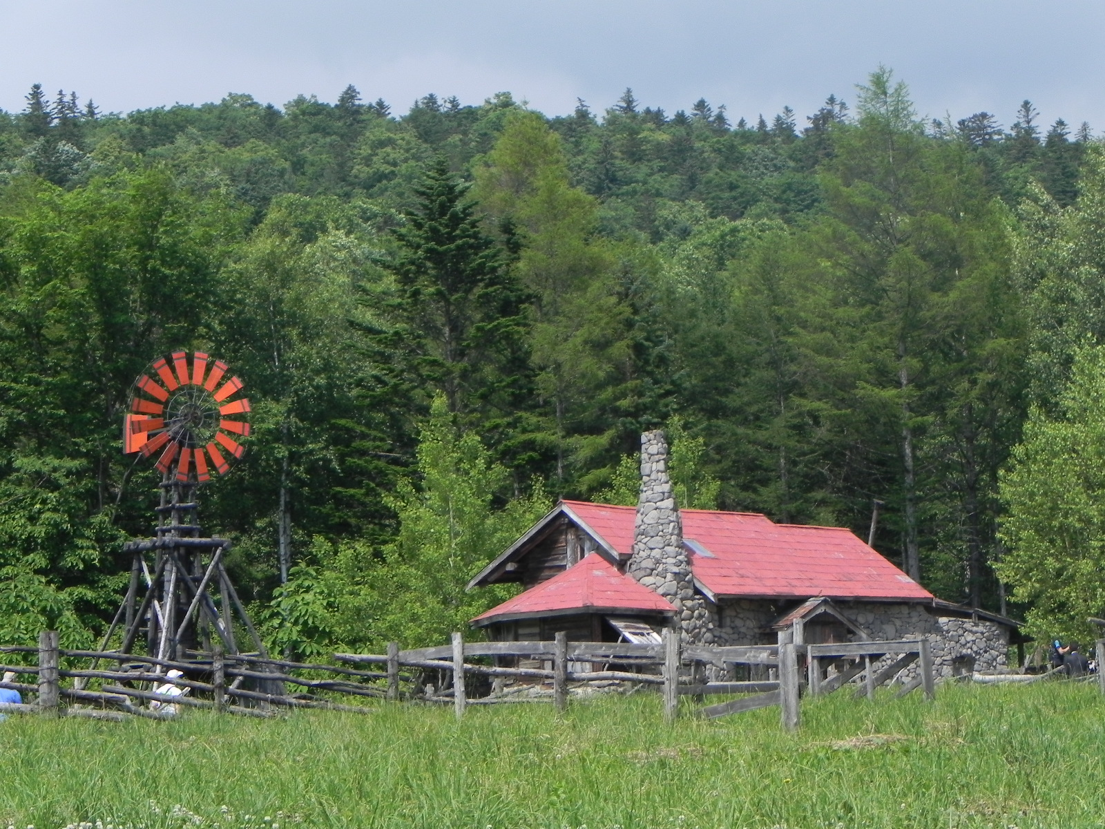 五郎さんの石の家